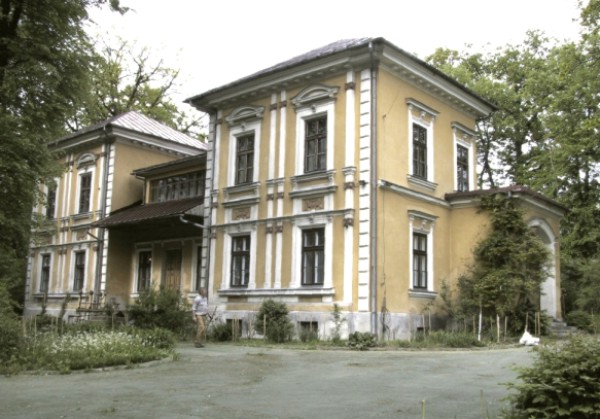 Klecza Dolna - dwór, pozostałości założenia parkowego (zabytek nr A-870/M) zdjęcie wykonane przeze mnie w kwietniu 2004--Michał 17:47, 22 lis 2004 (CET)